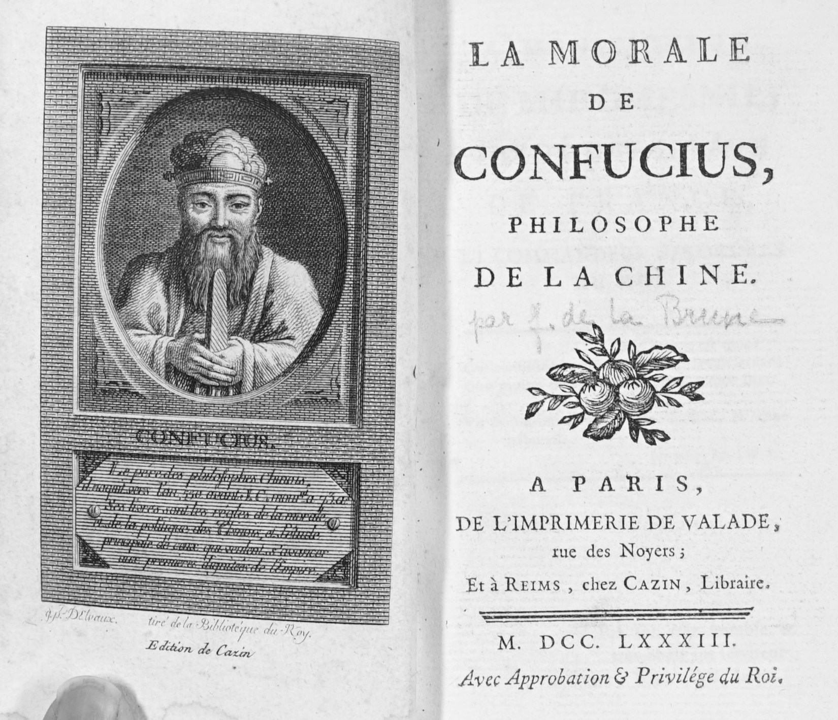 " la morale de Confucius philosophe de la Chine" imprimé chez Valade et Cazin.